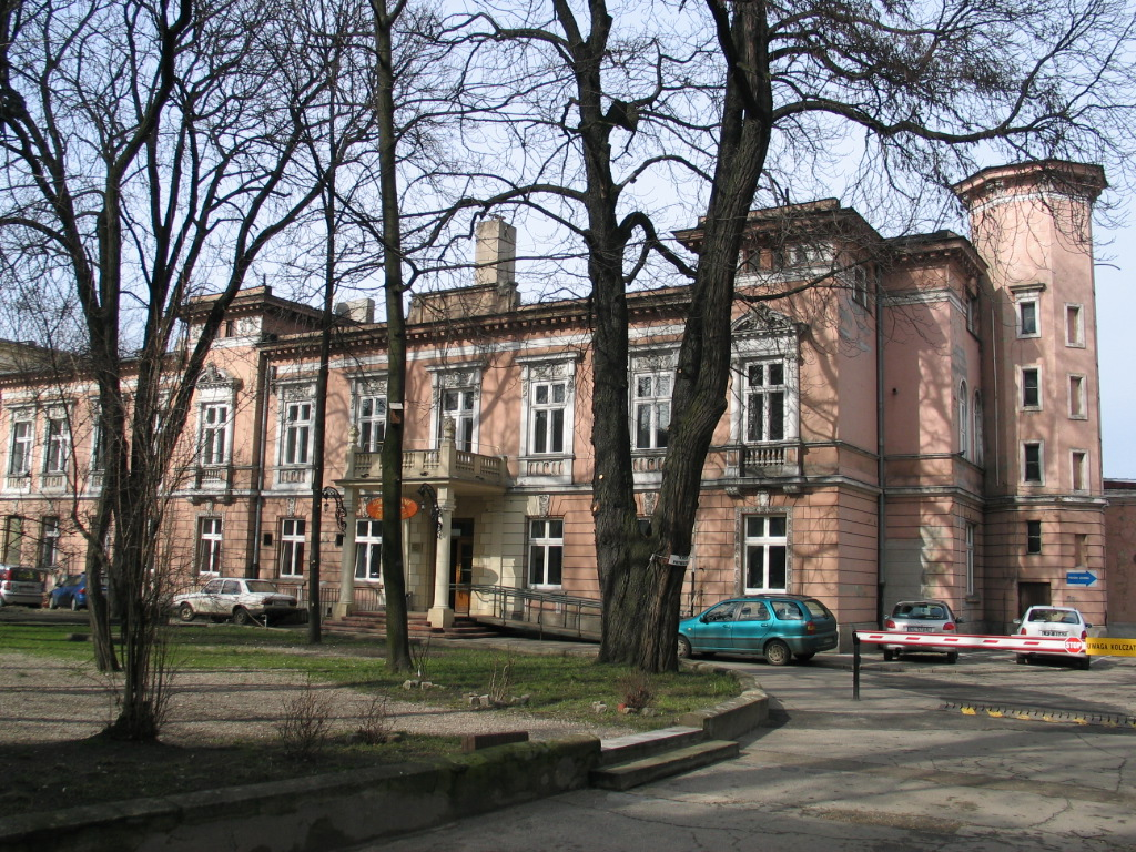 Budynek dawnego Banku Handlowego w Łodzi